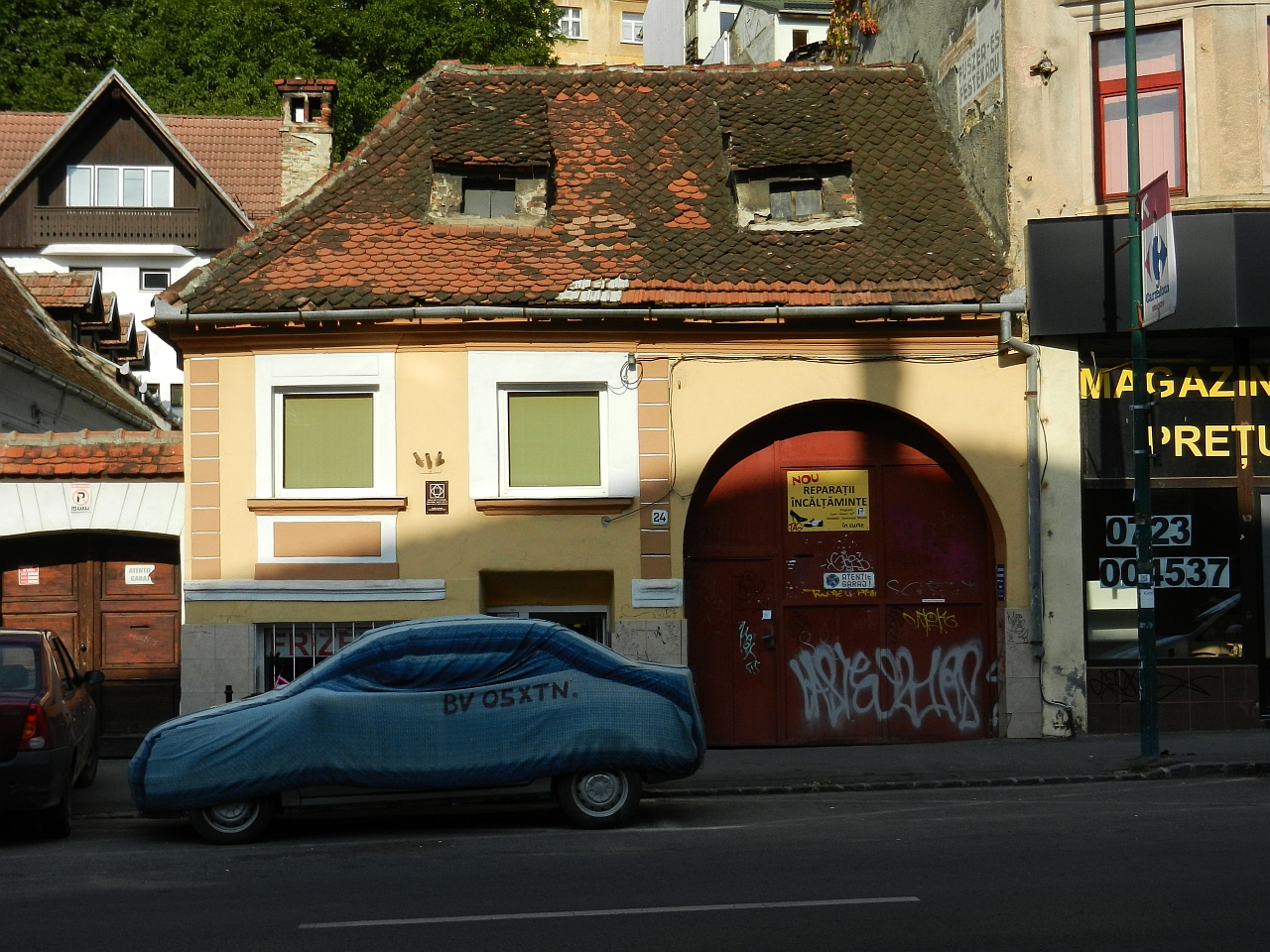 Casa monument istoric (Lunga 24)